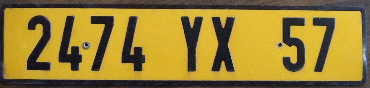 FRANCE pre EEC passenger plate